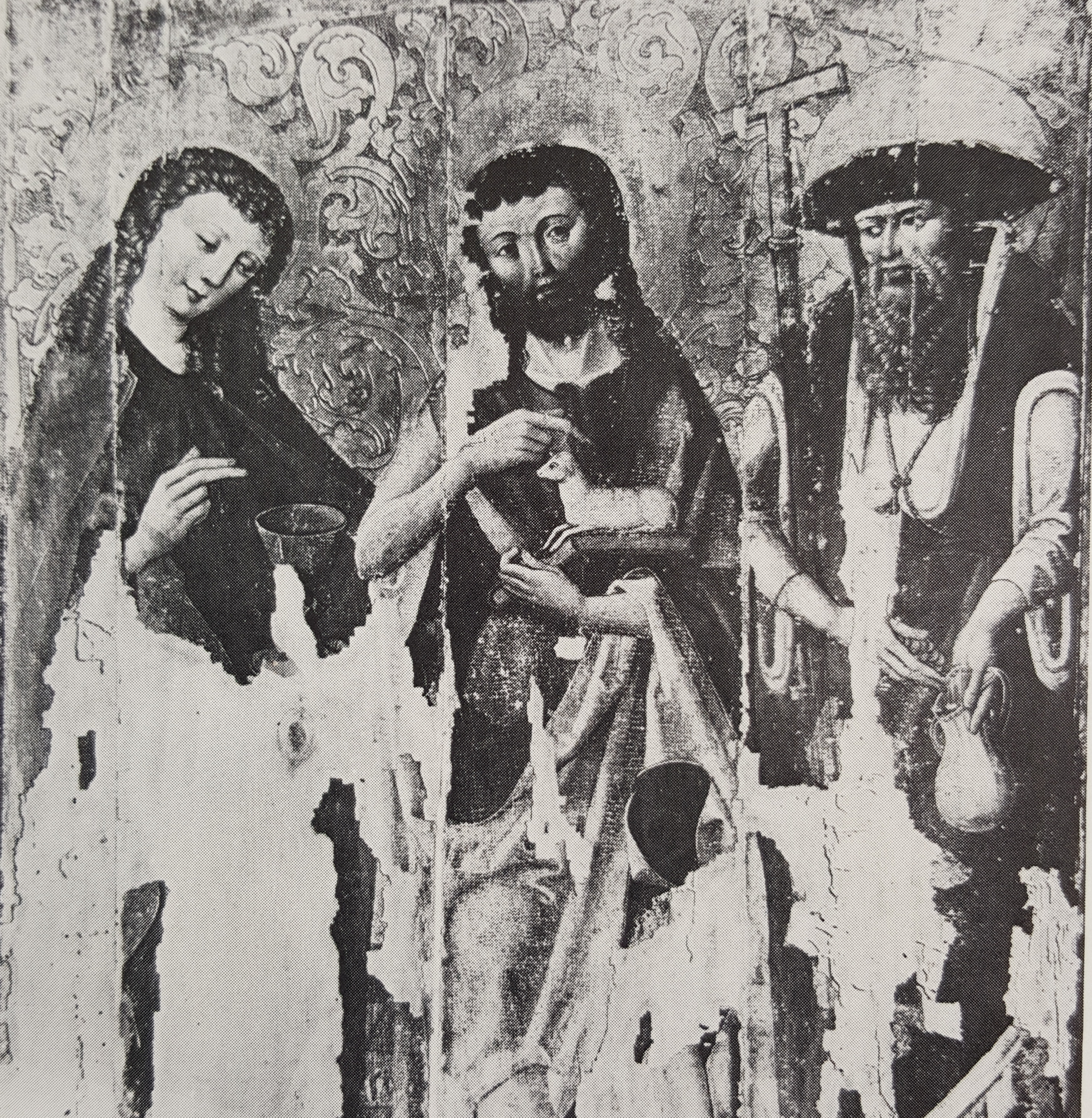 Trzej Święci, Mistrz Zwiastowania z Jodłownika, ok 1500-1510